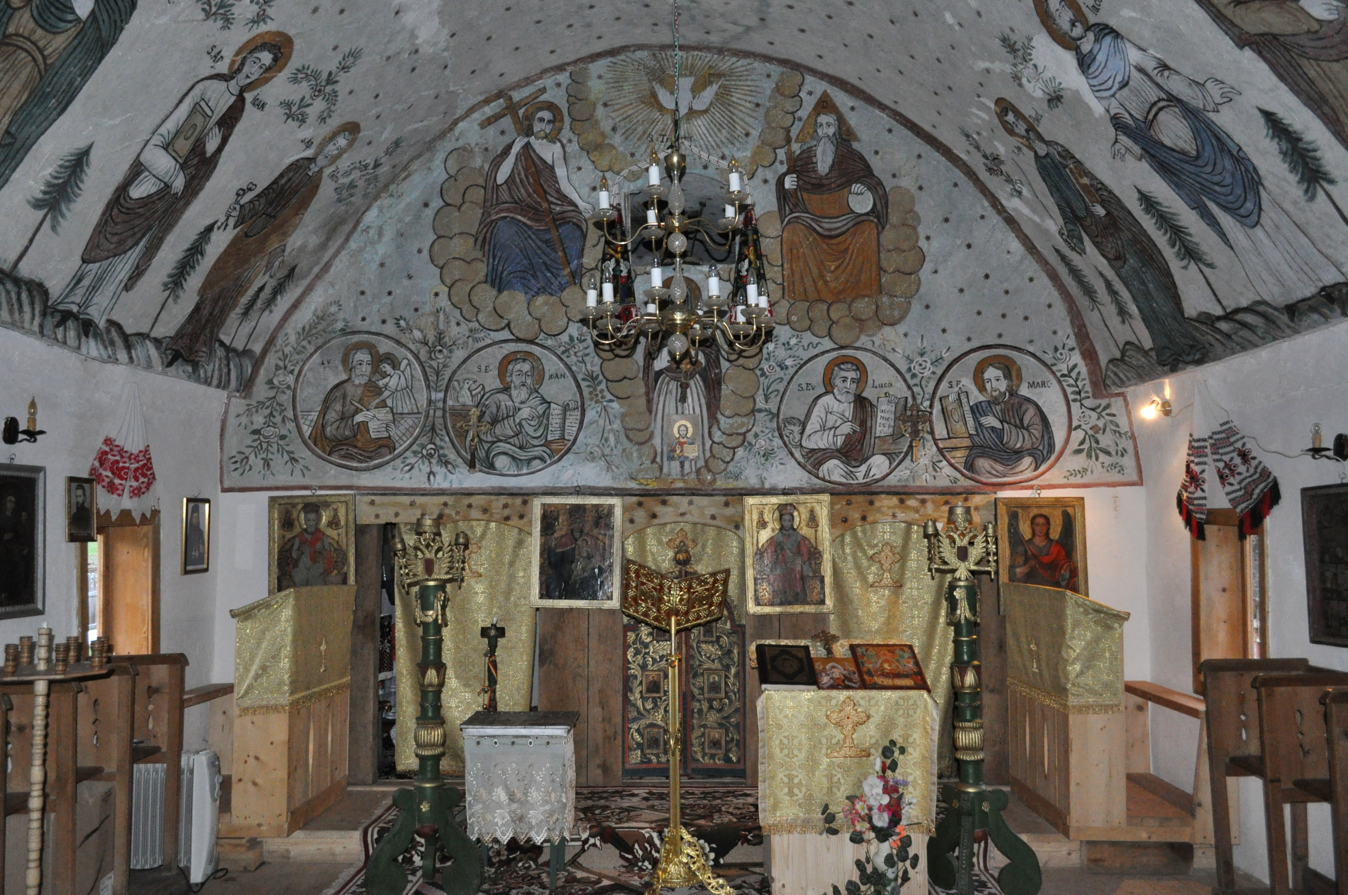 Biserica de lemn „Adormirea Maicii Domnului”,sat STĂNIJA; comuna BUCEŞ